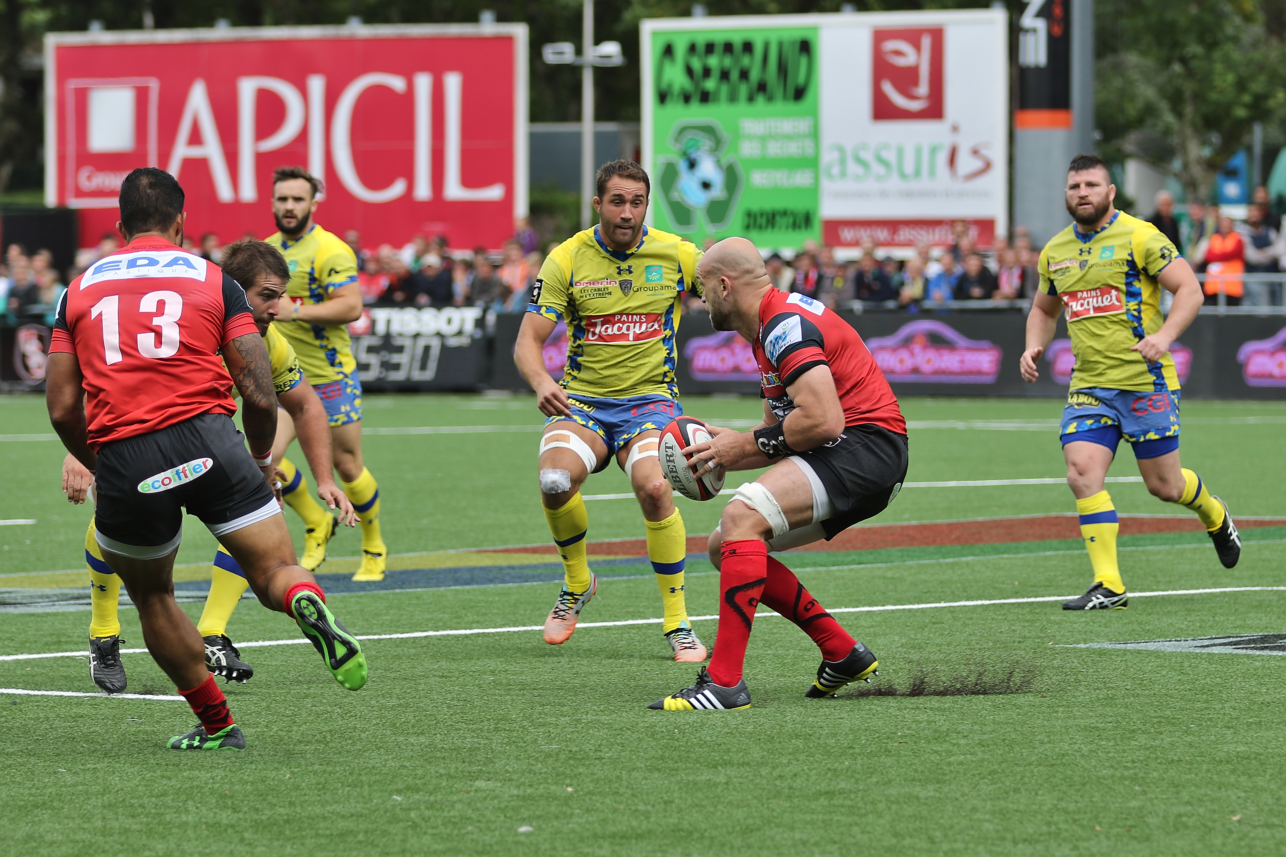 USO - ASM - 20150905 - Attaque de George Robson